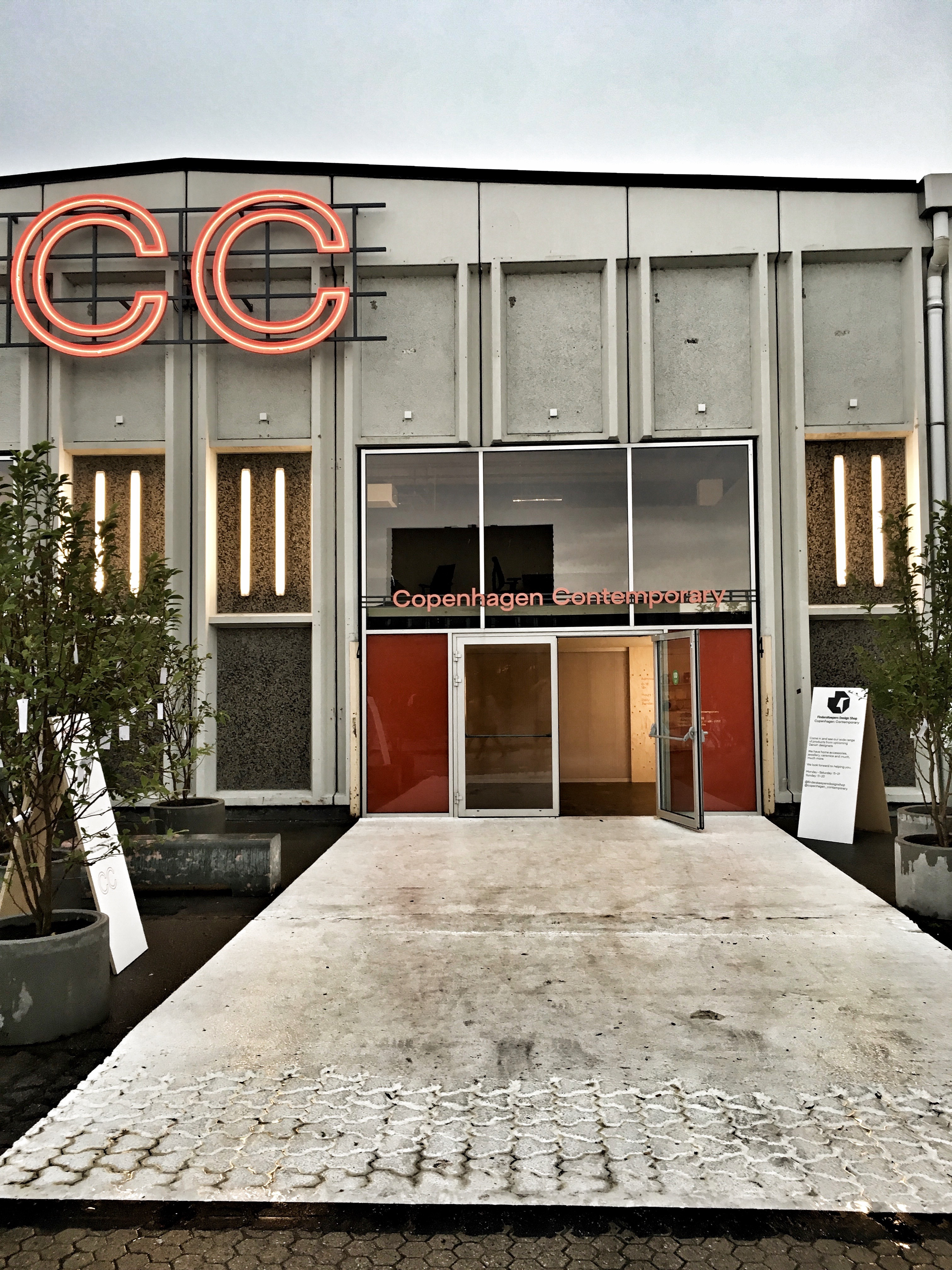 Contemporary Copenhagen på Papirøen, København